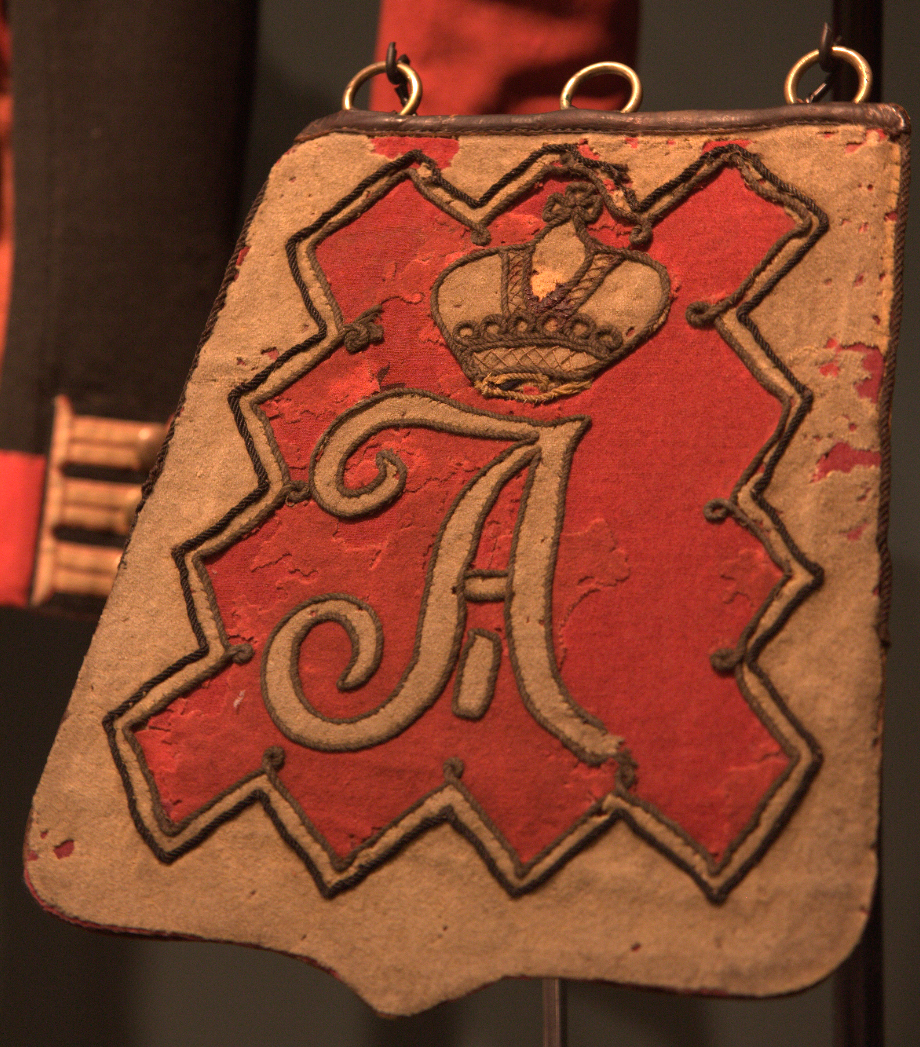 Ташка в Лейб-гвардии гусарском полку, образец с 1802 года по 1825 год, вензель на ташке менялся в связи со сменой императоров.